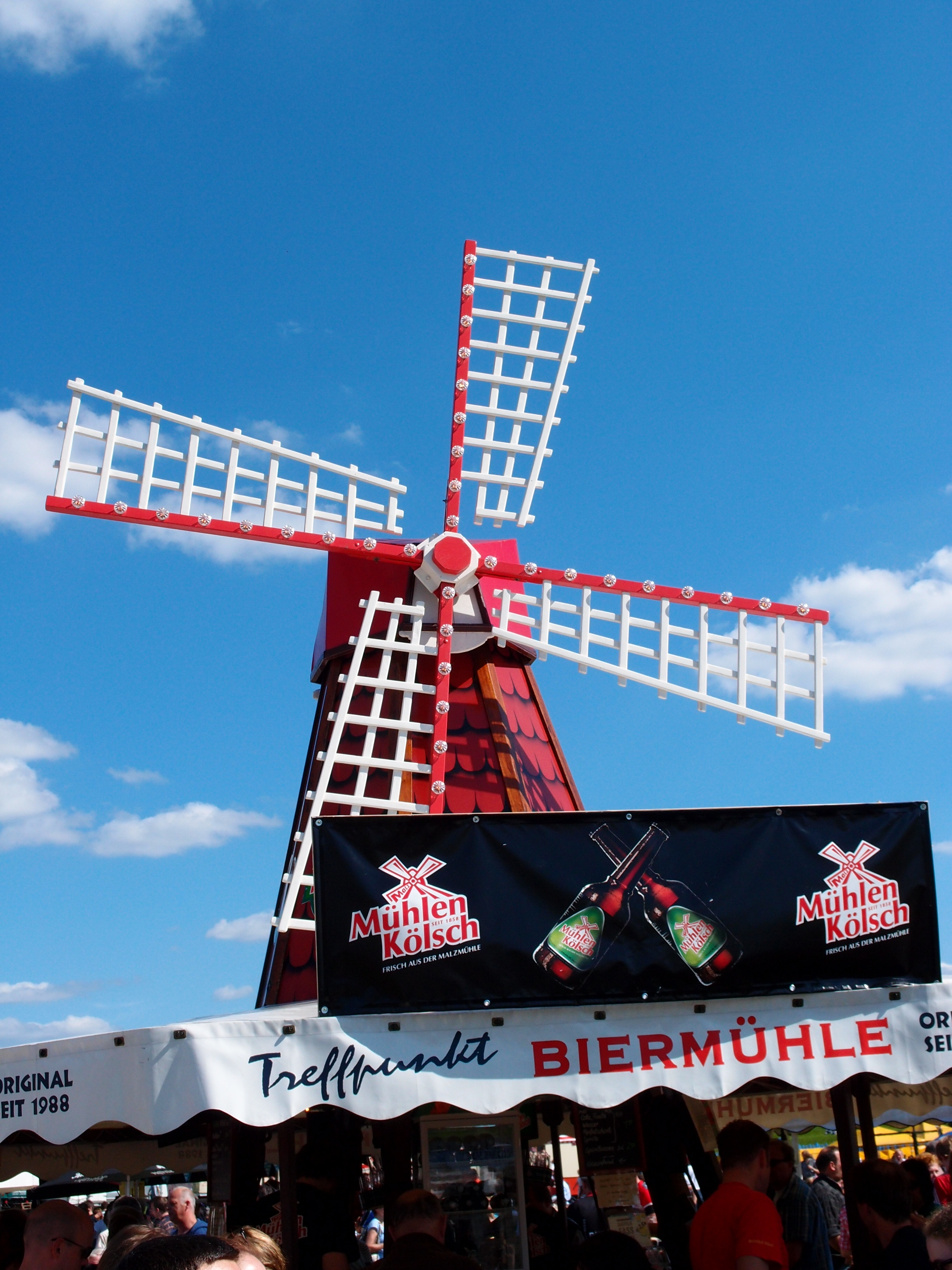 18. Bonner Bierbörse (Juli 2012), (Mühlen-Kölsch-Mühle) Datum: 22.07.2012 Urheber: M. Pfeiffer alias Benutzer:Gordito1869 Quelle: privates Fotoarchiv des Urhebers